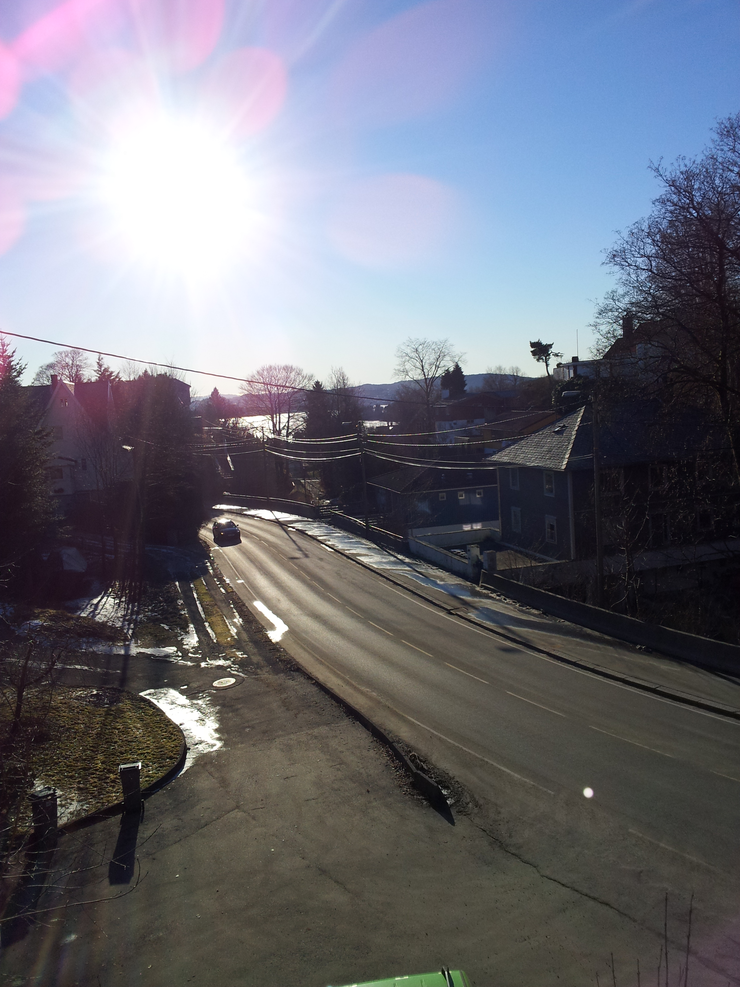 Paradis from Storetveitvegen.